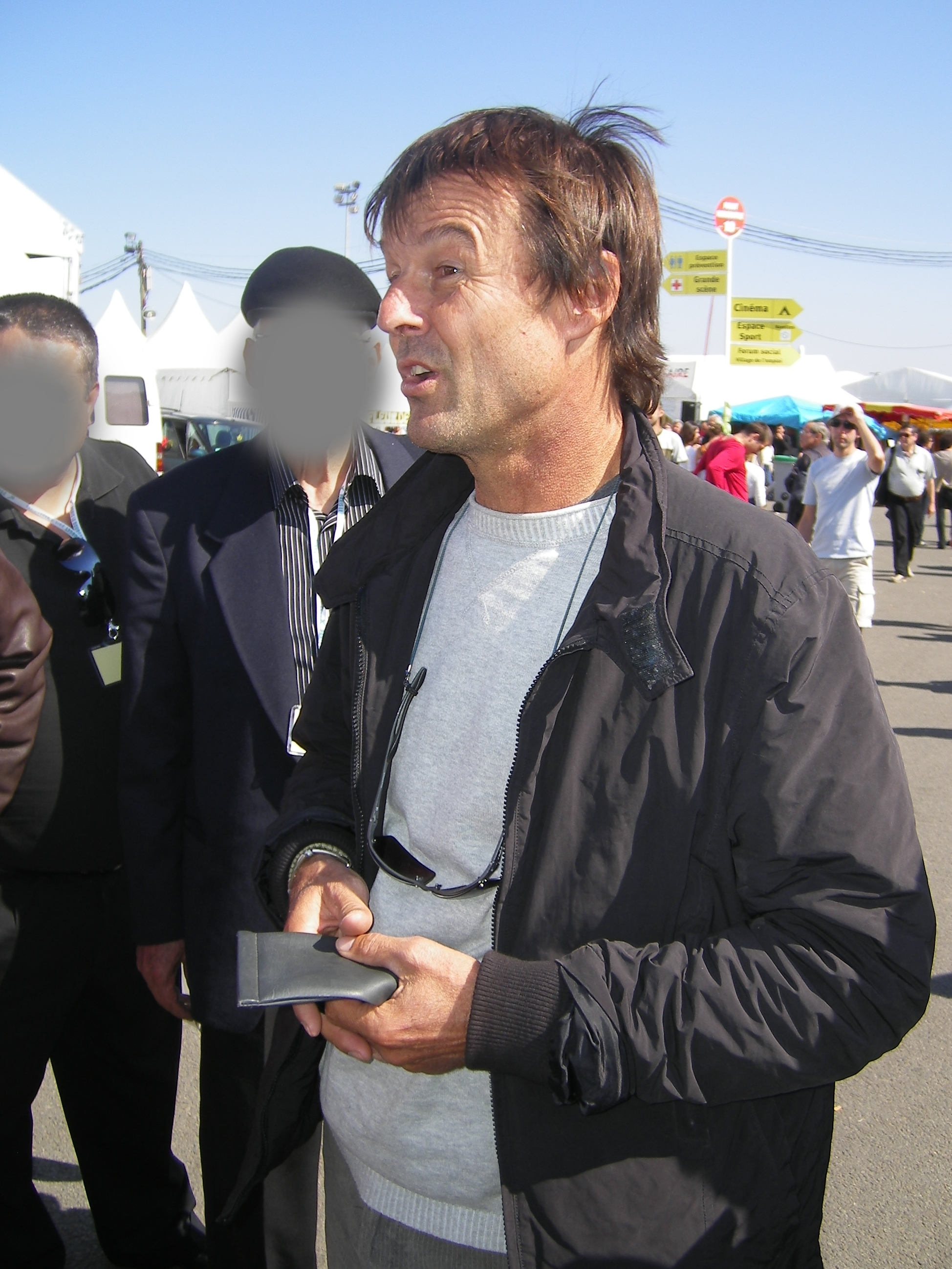 Nicolas Hulot à la fête de l'Huma 2008, le 14 septembre